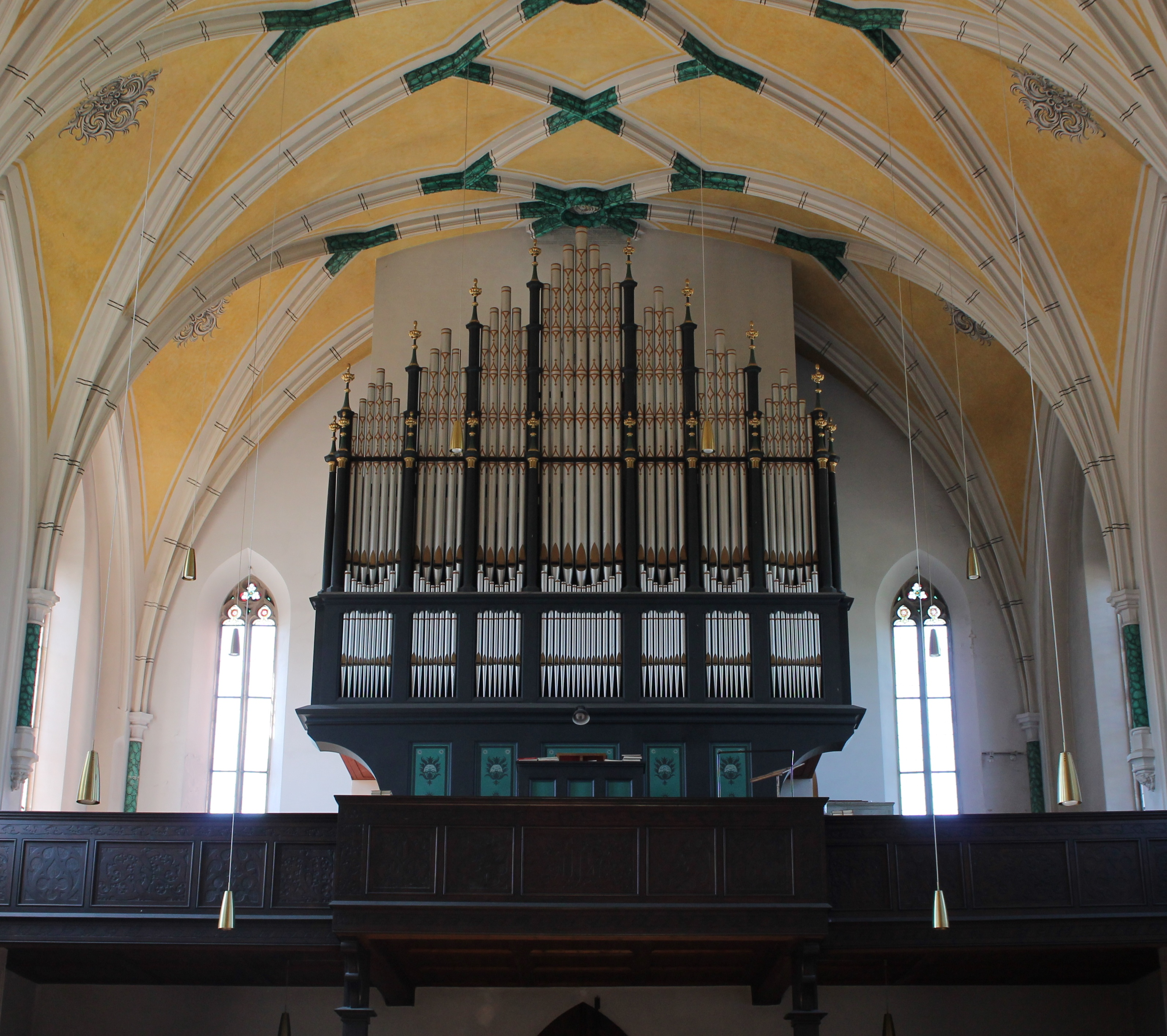 Orgel von St. Nikolaus in Übersee (1914, W. Siemann op. 309, II/24)